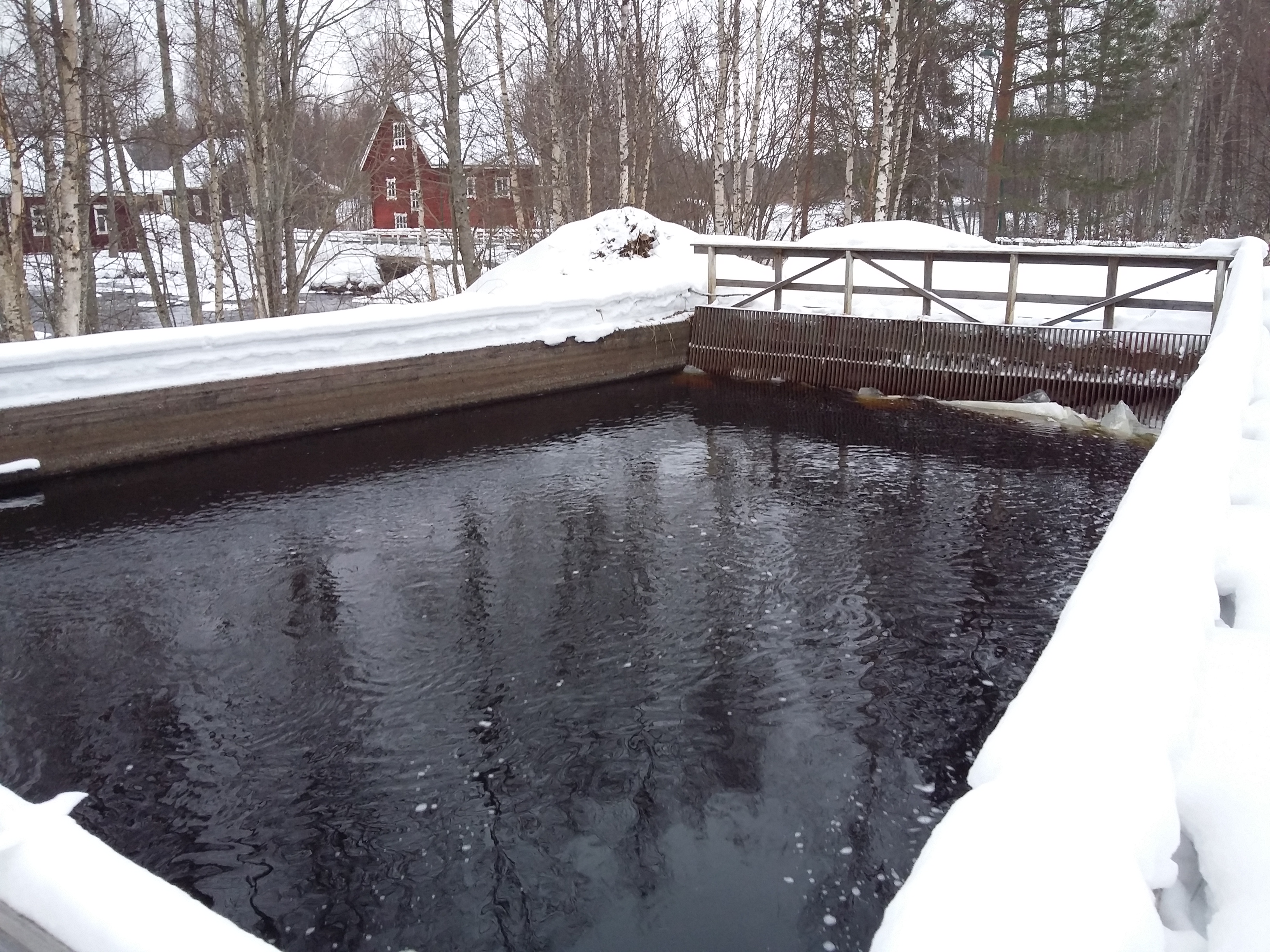 Huopanankoskella on vesivoimalaitos, jonka uoma näkyy kuvassa. Huopanankoski sijaitsee Viitasaarella, pohjoisessa Keski-Suomessa.